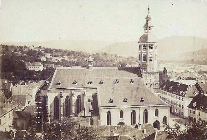 Henri-Charles Plaut: Die Stiftskirche in Baden-Baden kurz vor Abschluss der Renovation von 1867